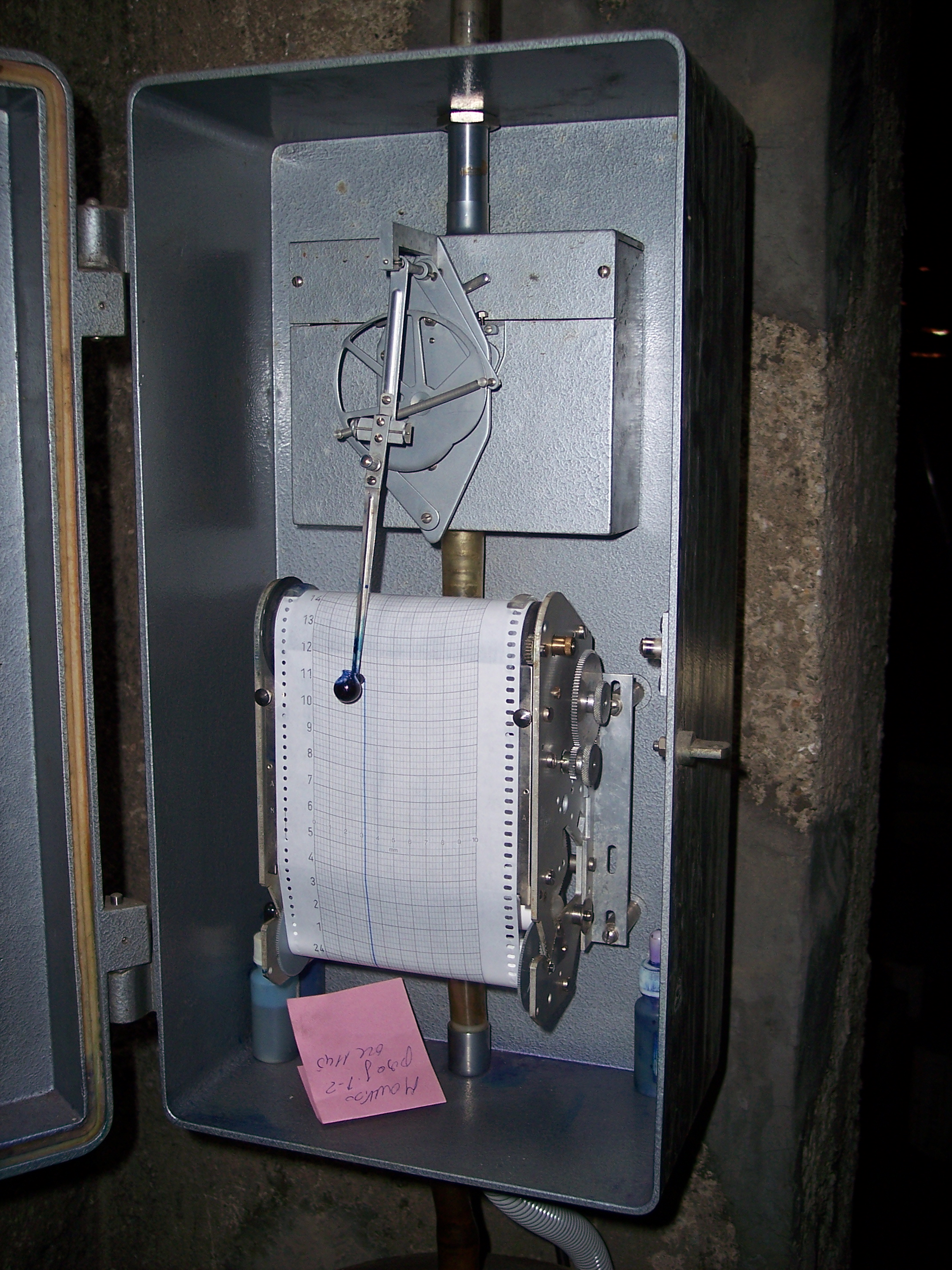 Pluviografo modello SIAP UM8150